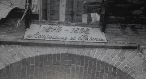 1848-1898. Przyjaciołom i potomnym